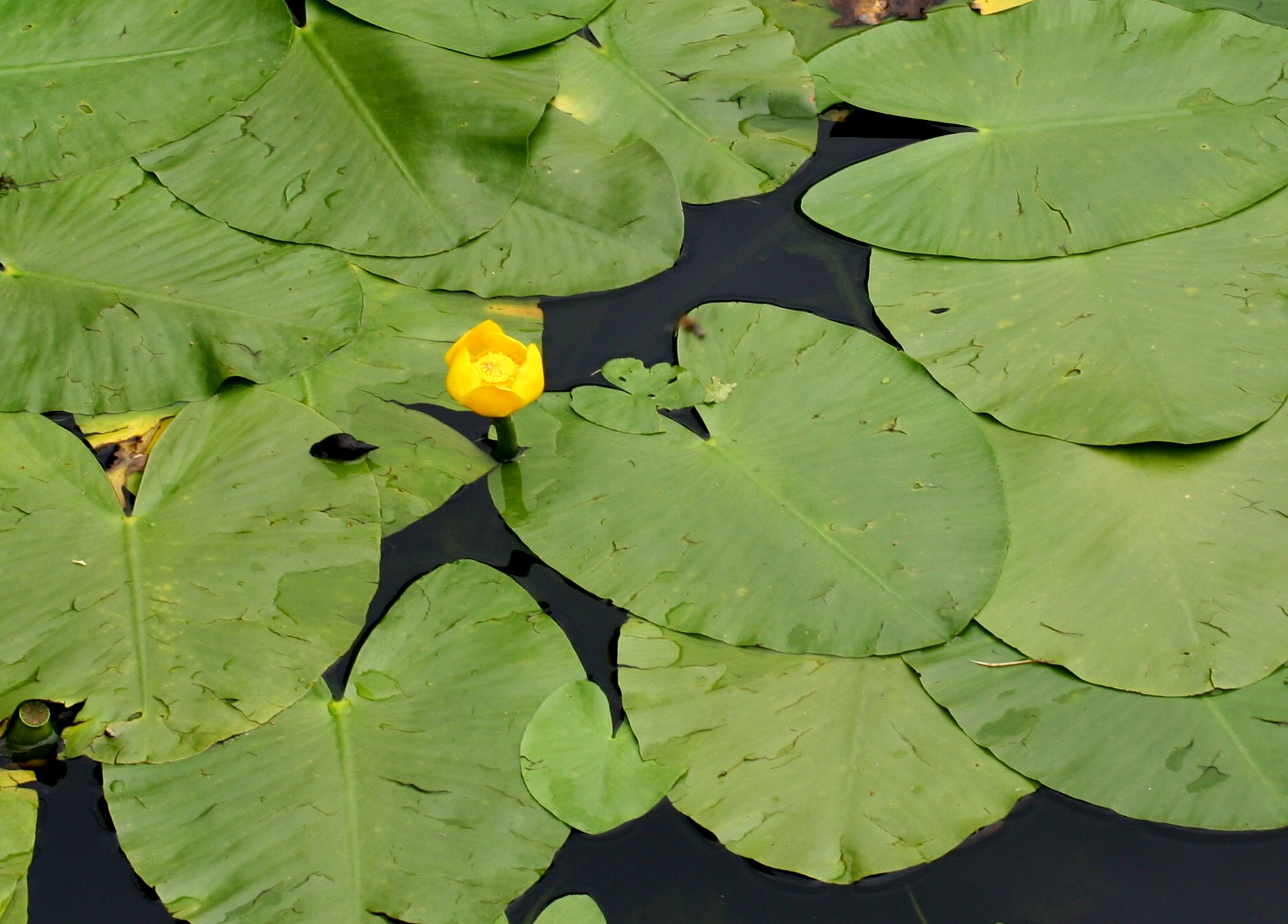 Ninfea gialla - Località : Giardino Botanico Alpino "Giangio Lorenzoni", Pian Cansiglio, Tambre d'Alpago (BL), 1000 m s.l.m.